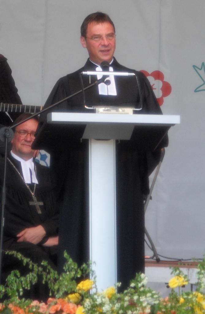 Volker Jung bei dem ersten Gottesdienst auf der Hauptbühne (im Goldsteinpark) auf der Landesgartenschau Bad Nauheim 2010.